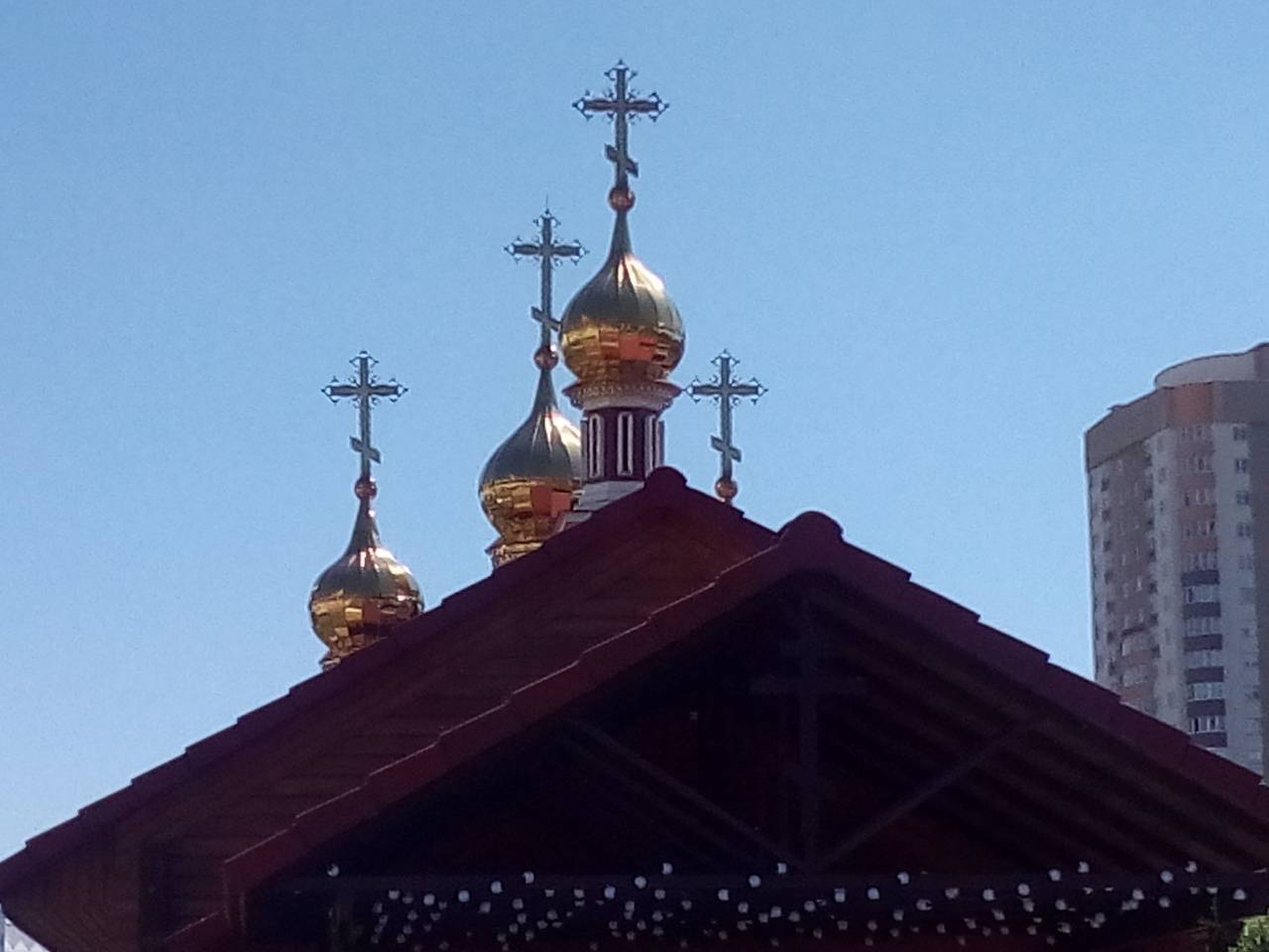 Беларуская (тарашкевіца): Драўляны храм Мікалая Японскага ў Менску (Беларусь) падчас Траецкага фэсту 27 траўня 2018 году. На купалах — расейскія праваслаўныя крыжы (расейскія крыжы), на ўваходзе — праваслаўны крыж (☦).